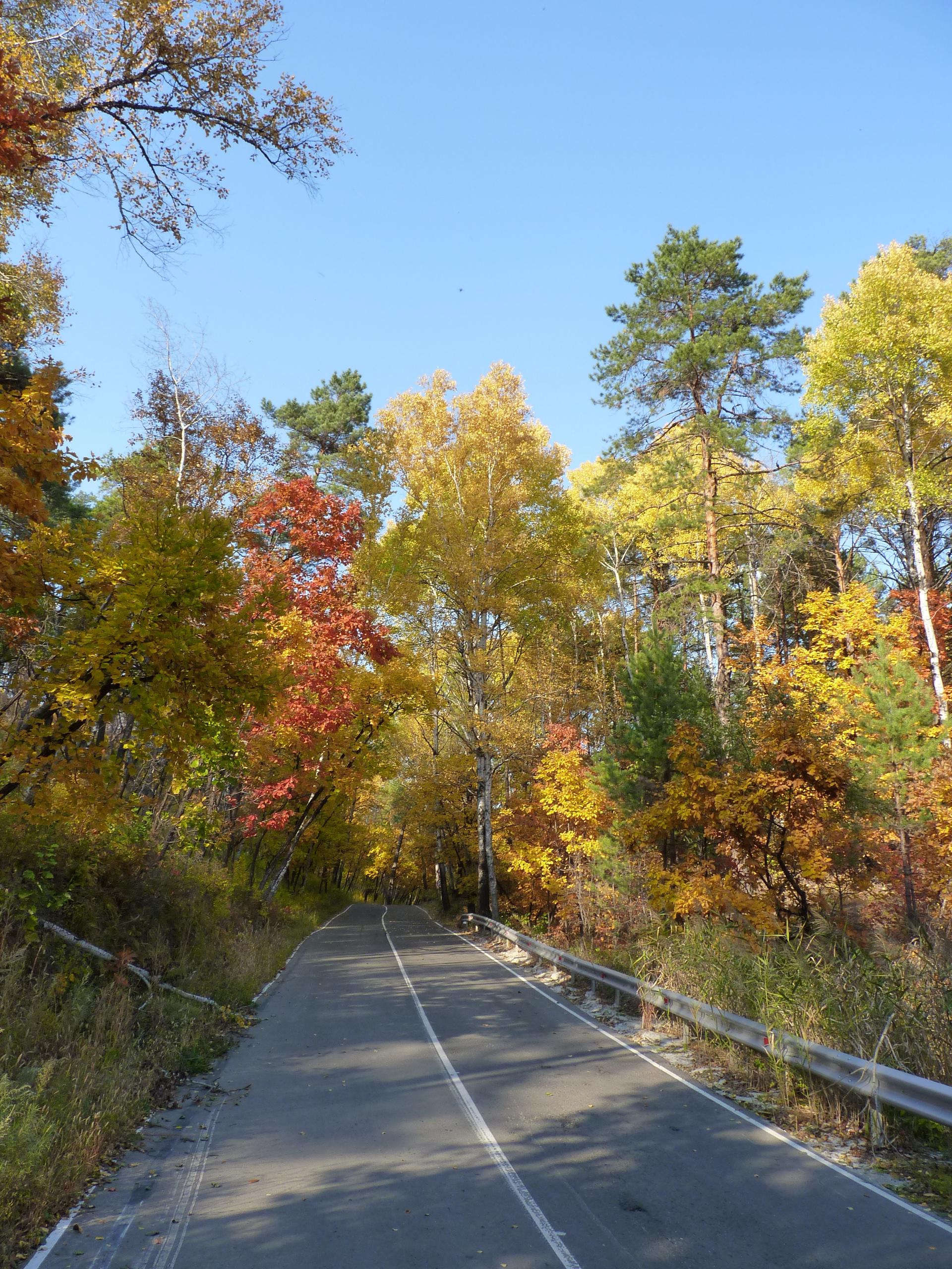 Мухинка: Благовещенский район, Амурская область This image is related to the protected area of Russia number 2810045